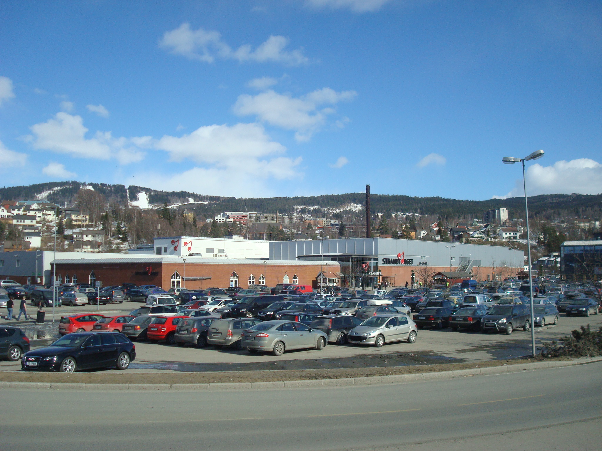 Strandtorget på Lillehammer.